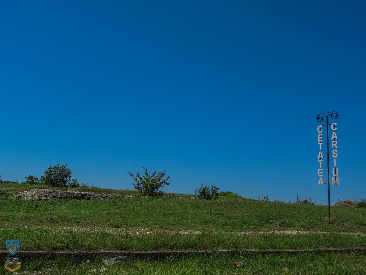 Situl arheologic de la Hârșova